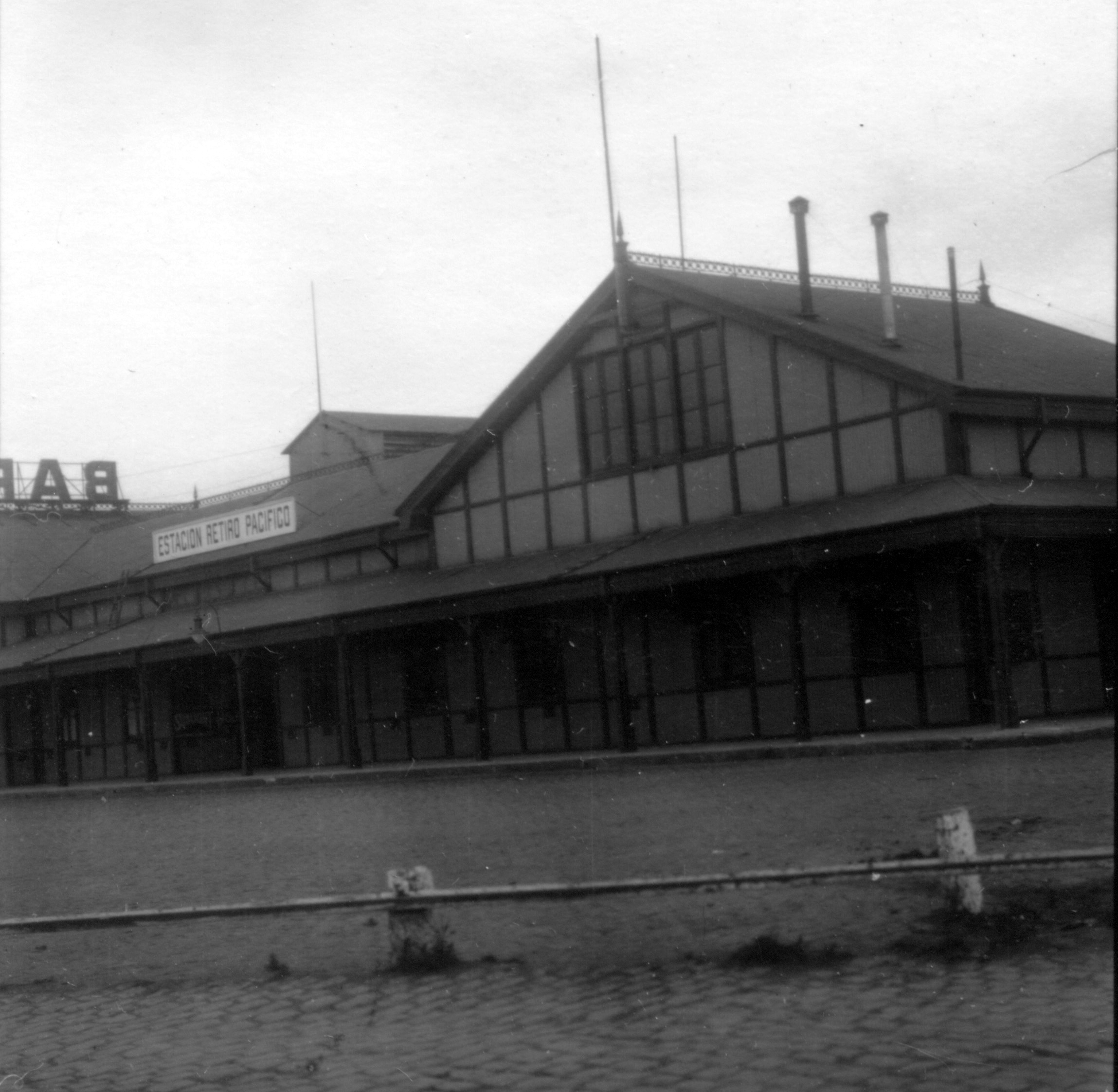 Vista exterior de la estación Retiro del entonces Ferrocarril Buenos Aires al Pacífico